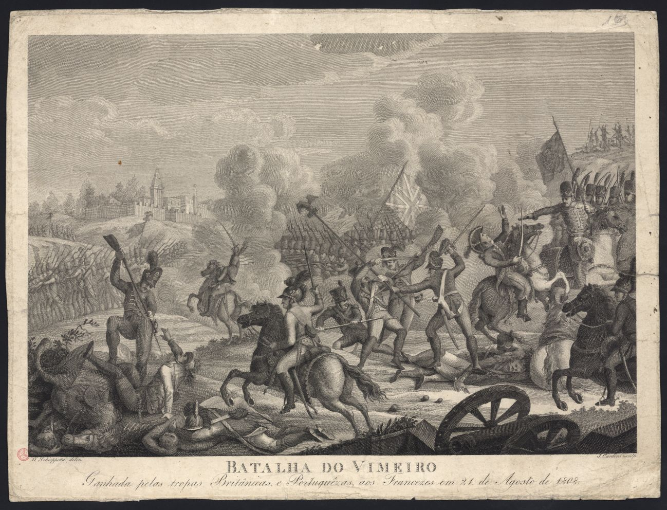 gravure de la Bataille du Vimeiro, Lourinhã